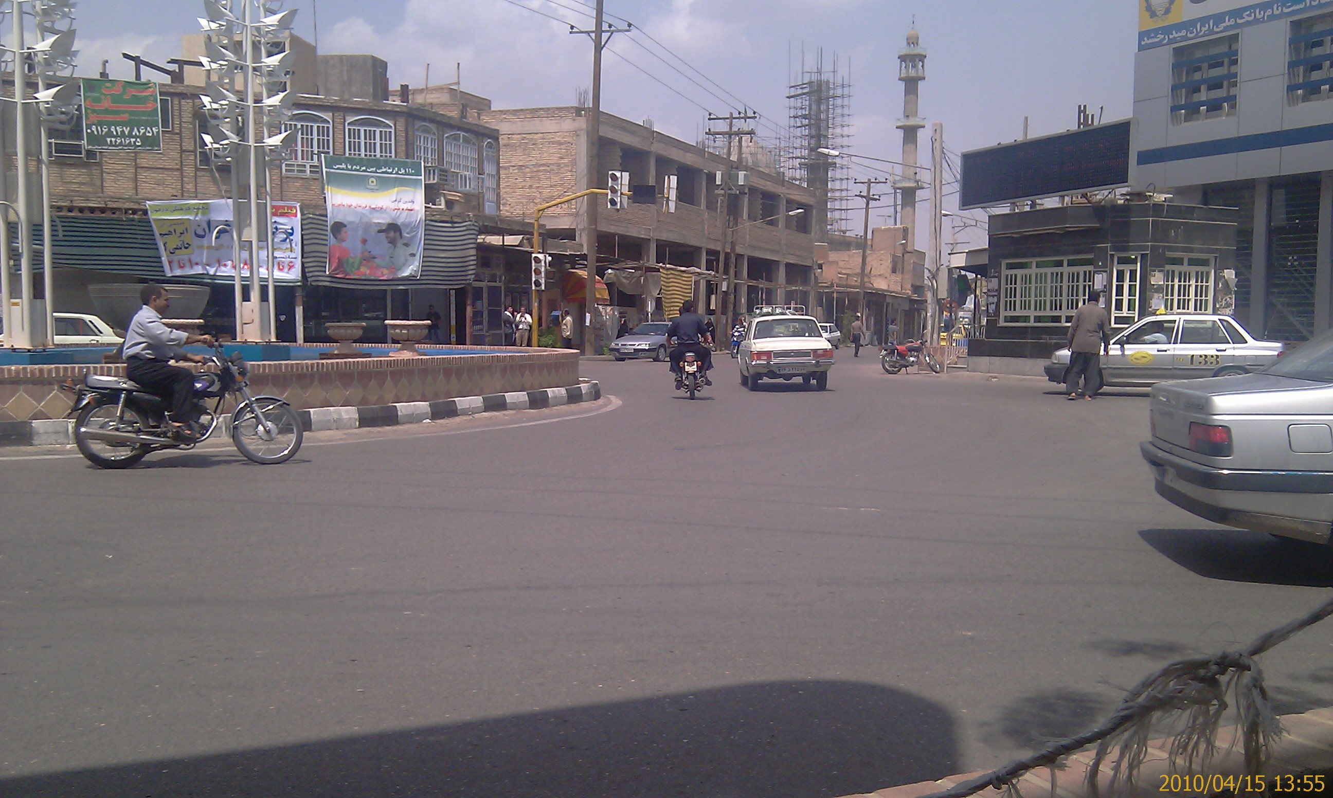 دزفول خیابان شریعتی - چهارره